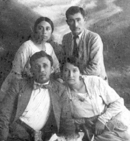 ישובים: שרה אהרנסון ויוסף לישנסקי. עומדים טובה גלברג וניסן רוטמן